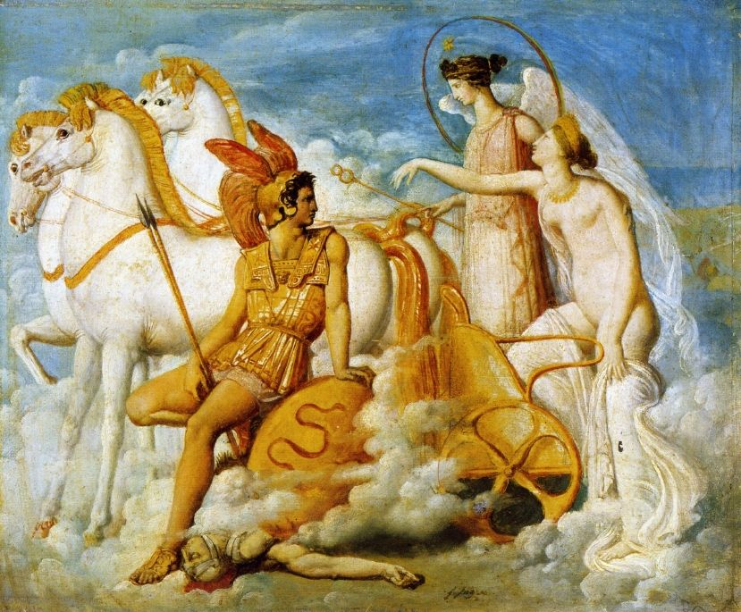 Ingres, Vénus blessée par Diomède (1800) Kunstmuseum Basel Suisse